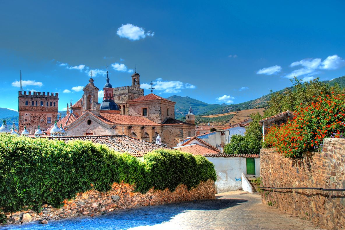 Real Monasterio de Santa María de Guadalupe